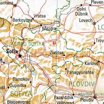 Prawez - Lage des Ortes in Bulgarien